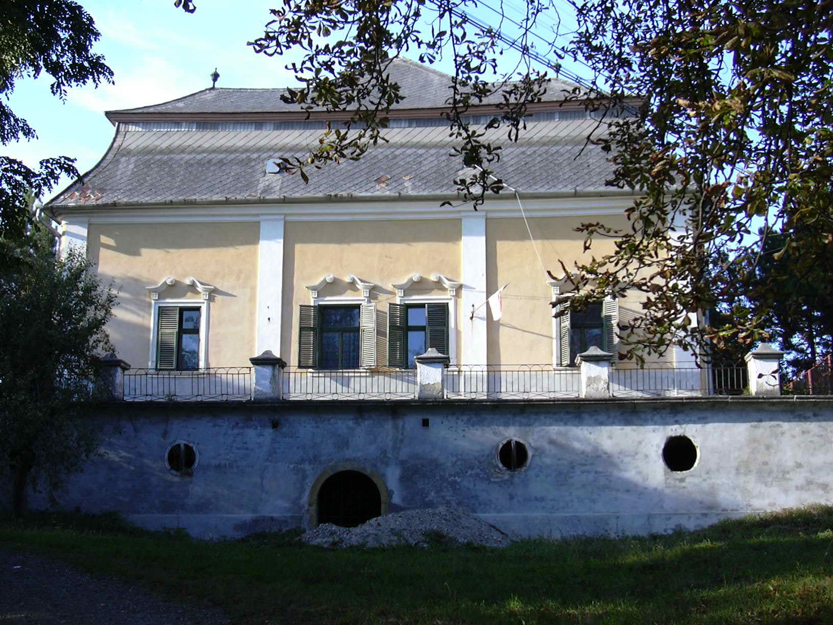 Wesselényi-kastély, Hadad